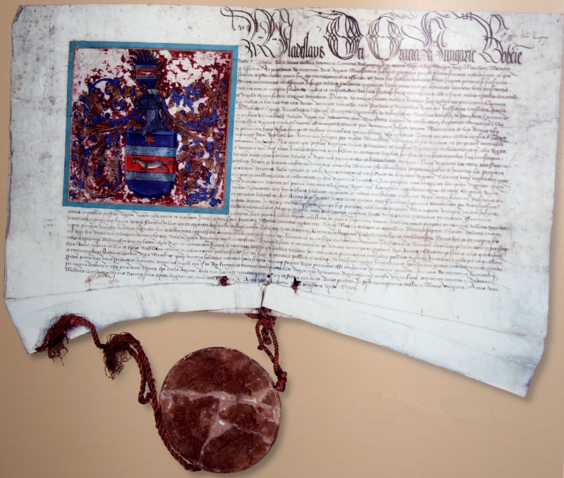 Grbovnica Kraljevine Slavonije